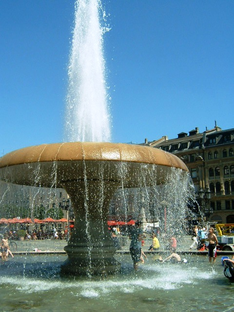 Während eines Kinderfestes in Frankfurt am Main am Brunnen auf dem Opernplatz